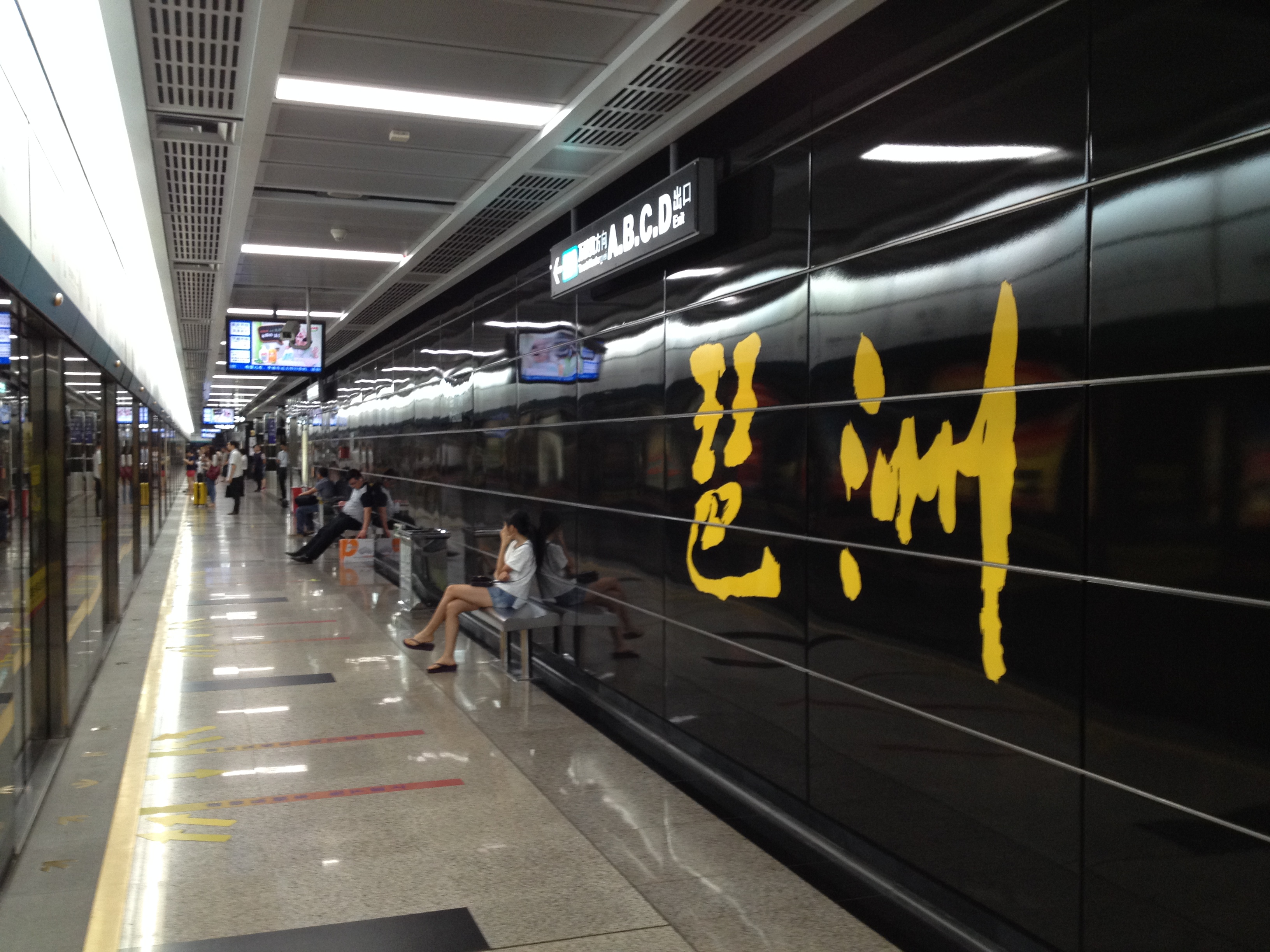 广州地铁琶洲站月台（凤凰新村方向）